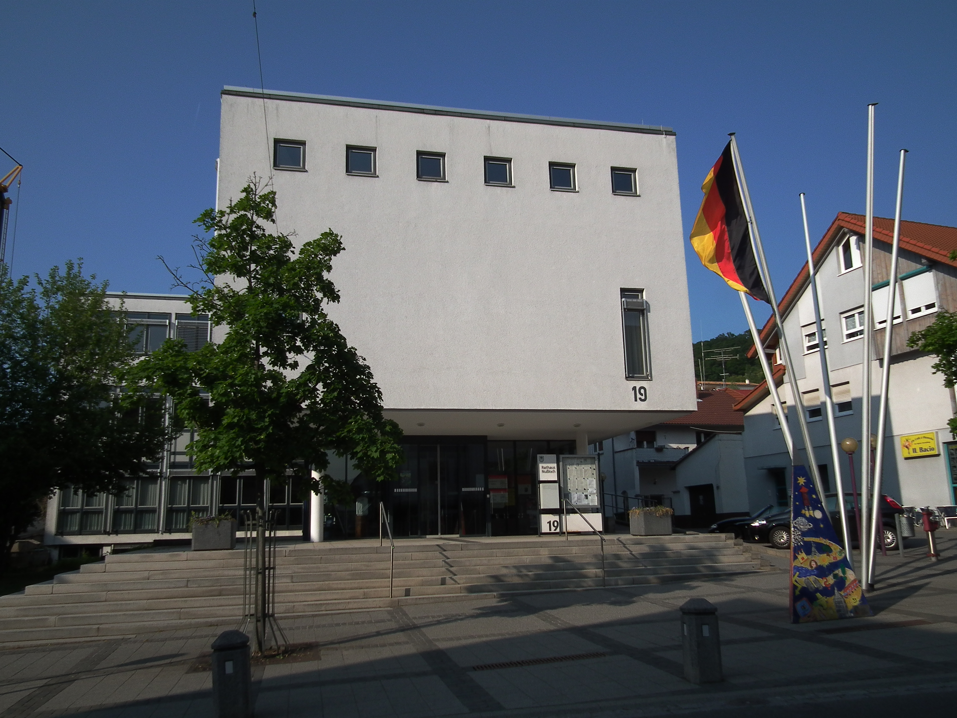 Rathaus in Nußloch (Baden-Württemberg, Deutschland)